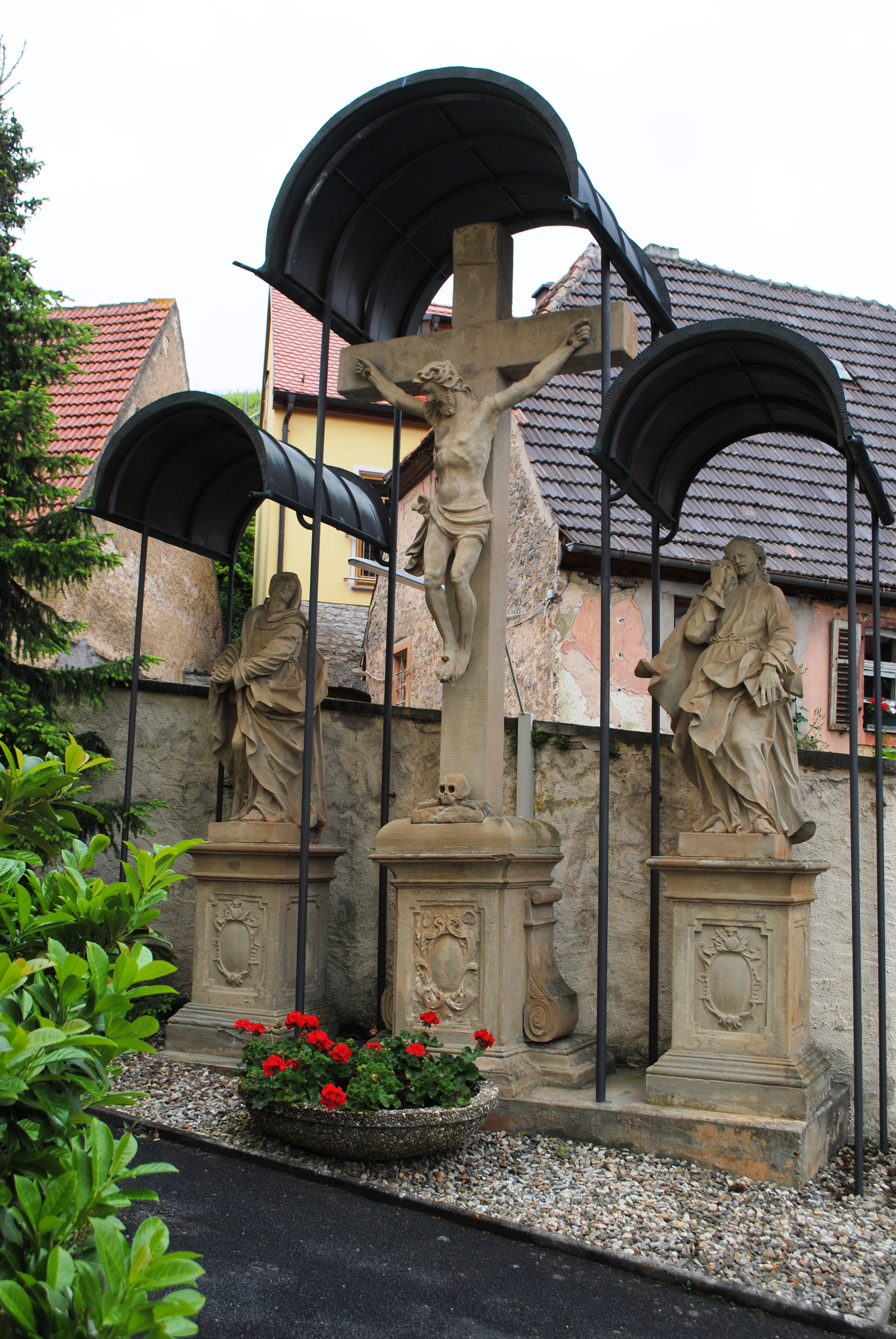 Kreuzigungsgruppe, Escherndorf, D-6-75-174-198